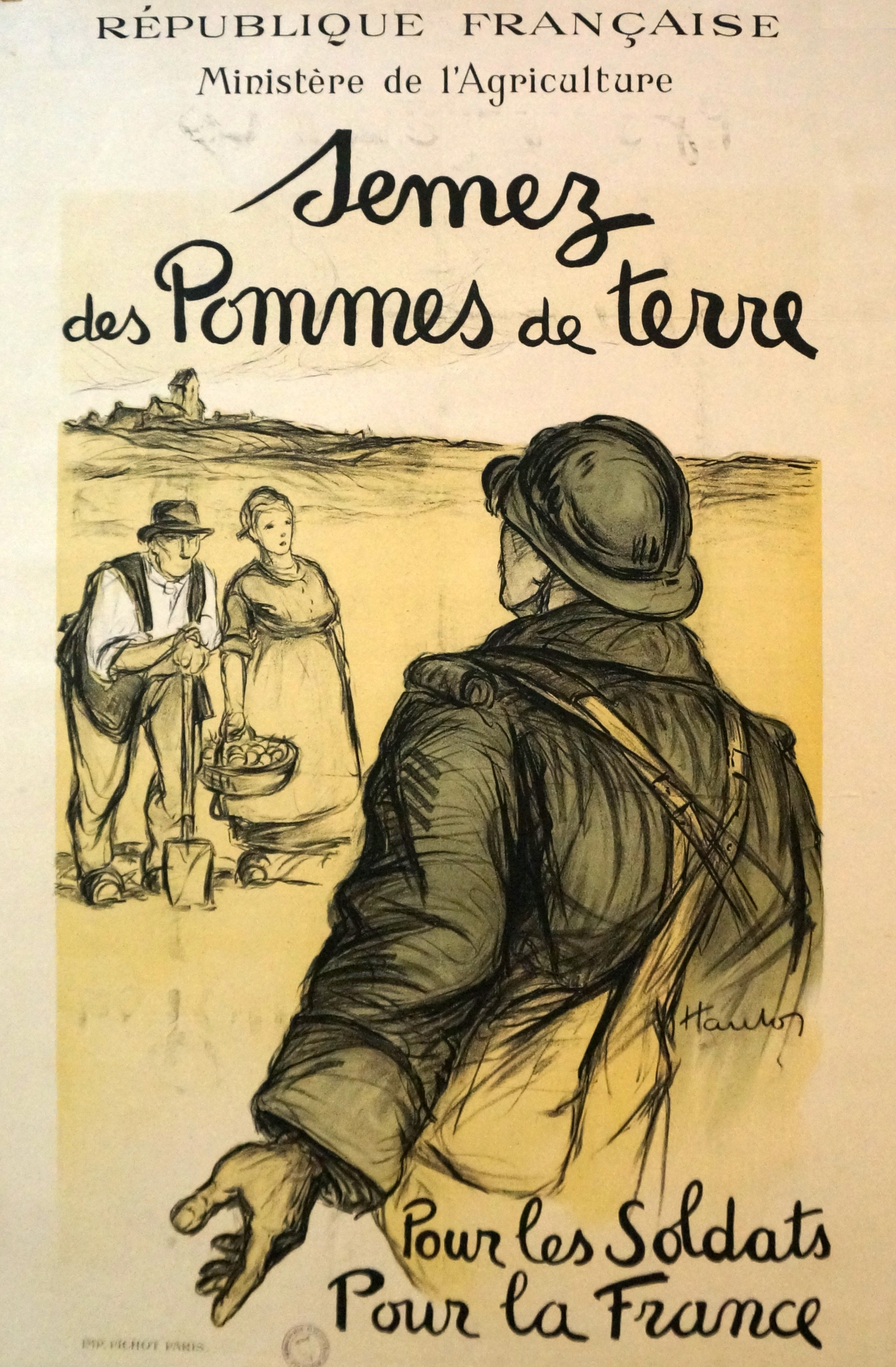 Lors de l'exposition Vitry ville hôpital 1914 2014. Avec l'aimable autorisation de M. le Maire pour la reproduction des affiches de la bibliothèque municipale.